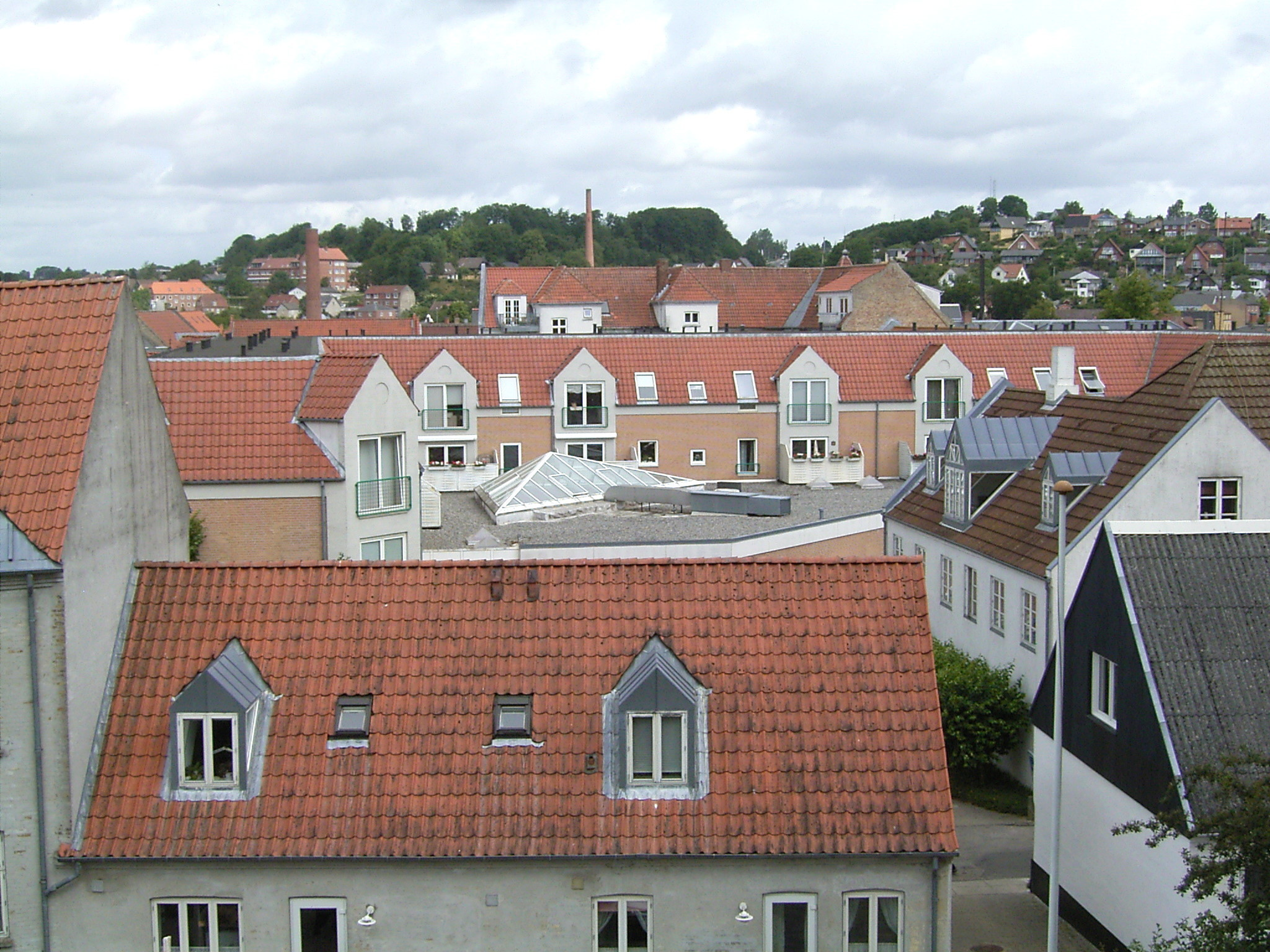 Hobro